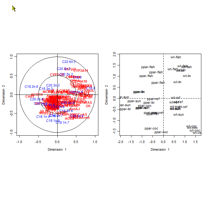 Analyse Canonique des Correlations : représentation des variables et des individus dans le plan des deux premières variables canoniques sur les données nutrimouse du package CCA de R d'après l'article CCA: An R Package to Extend Canonical Correlation Analysis de Ignacio Gonz�alez, S�ebastien D�ejean, Pascal G. P. Martin, Alain Baccini dans le Journal of Statistical Software (volume 23, issue 12, January 2008)